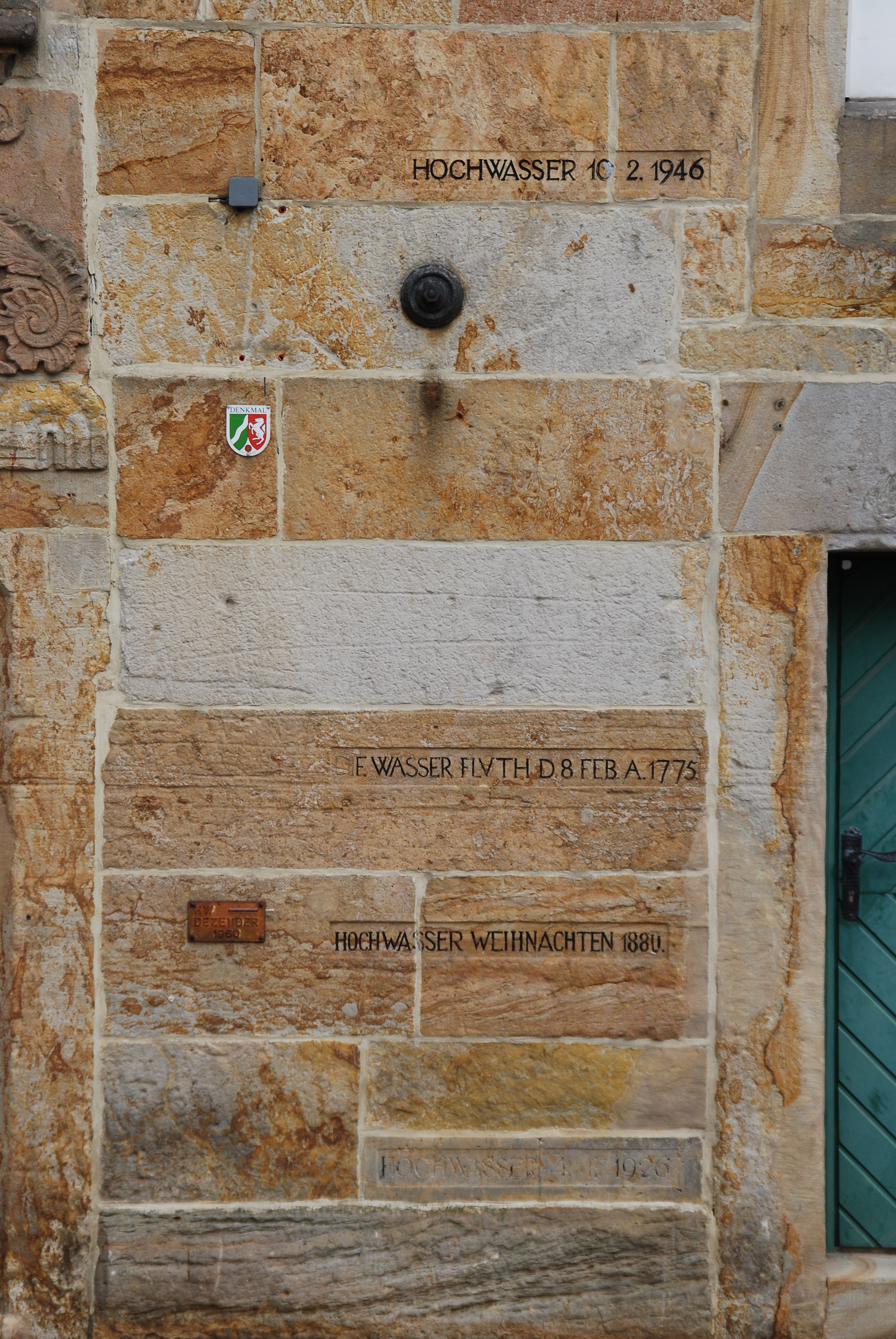 Hochwassermarke Emsmühle Rheine